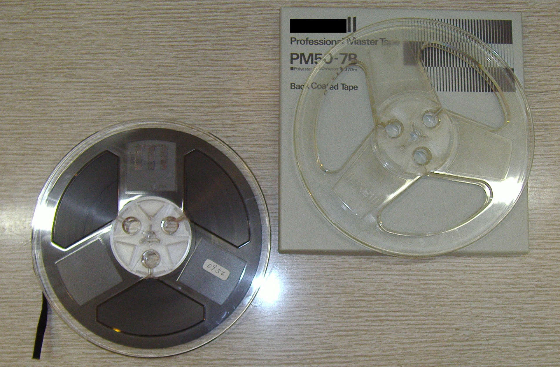 Magnetic audio tape & reel. size 7 inch (diameter)